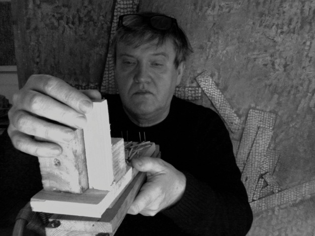 Oscer Pioppi mit Traghetto-Modell